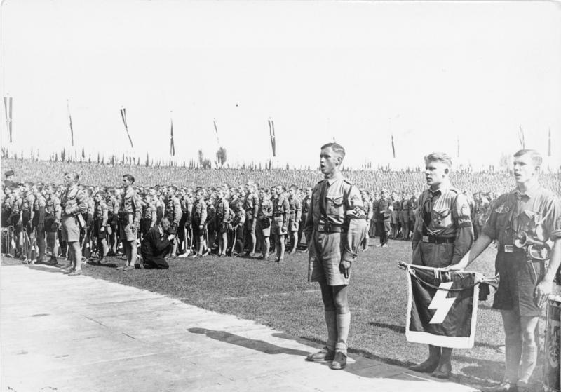 Der Reichsparteitag der NSDAP in Nürnberg 1934. Hitlerjugend im Nürnberger Stadion angetreten zum Appell vor ihrem Führer Adolf Hitler